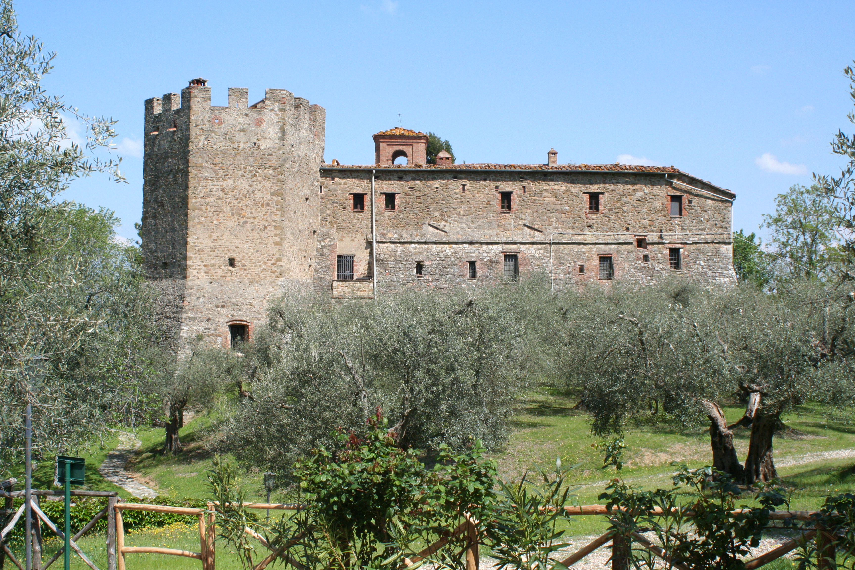 Badia di Sant Arcangelo, Südseite